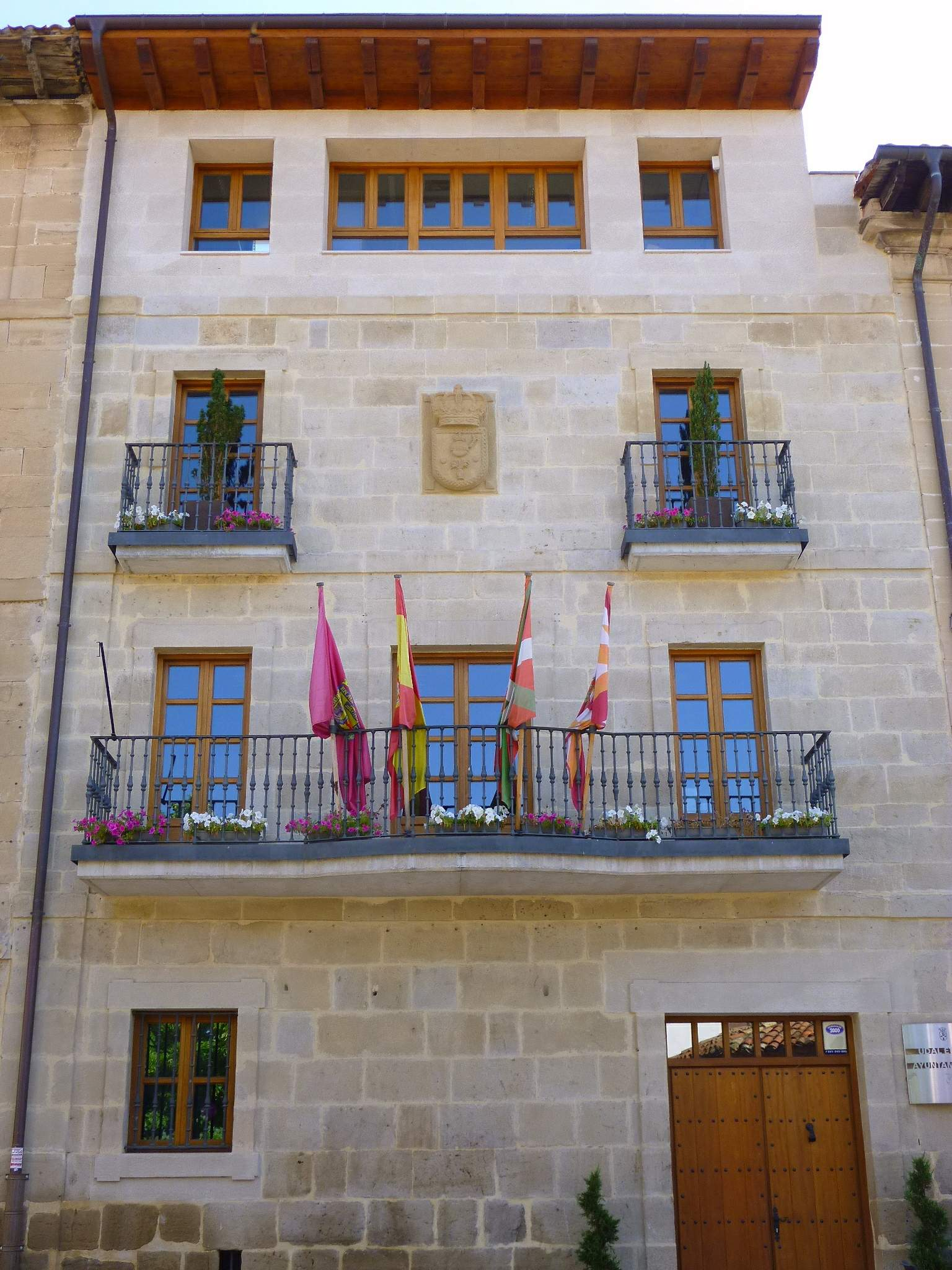 Ayuntamiento de Oyón (Álava)